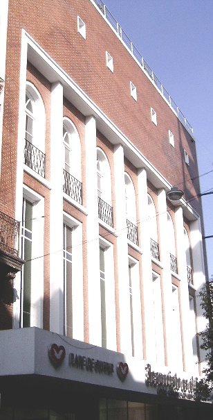 Fachada del Cine Gran Rex, en Rosario (Argentina). Luis Antonio Blotta Stengel Propia Cámara digital HP photosmart 635